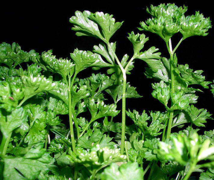 Petersilie